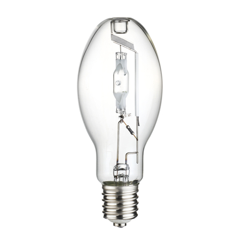 Photo of the Metal Halide Bulb